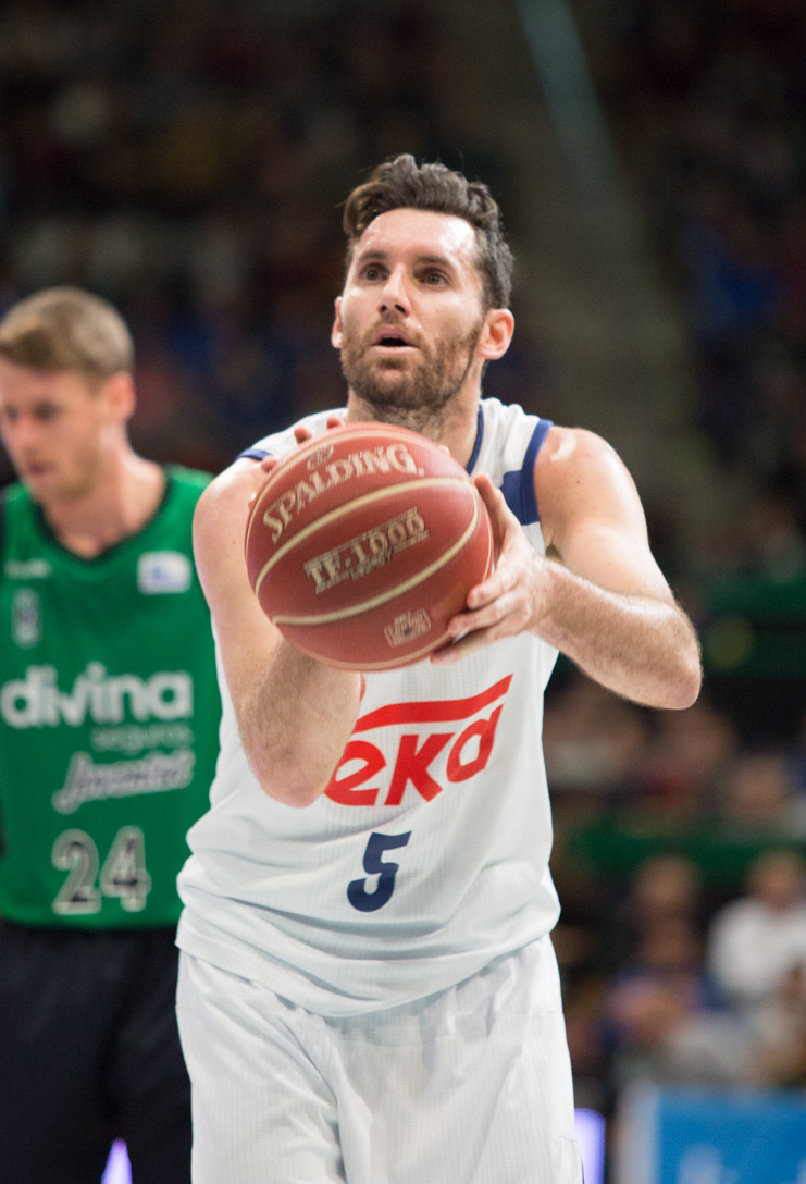 Rudy Fernández con la camiseta del Real Madrid en un partido en el Olímpico de Badalona durante la temporada 2016-17.